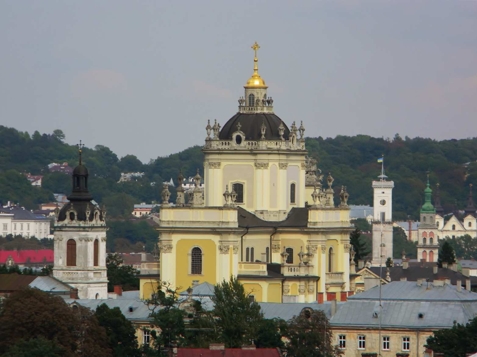 Собор святого Юра, Львів, св. Юра пл., 5